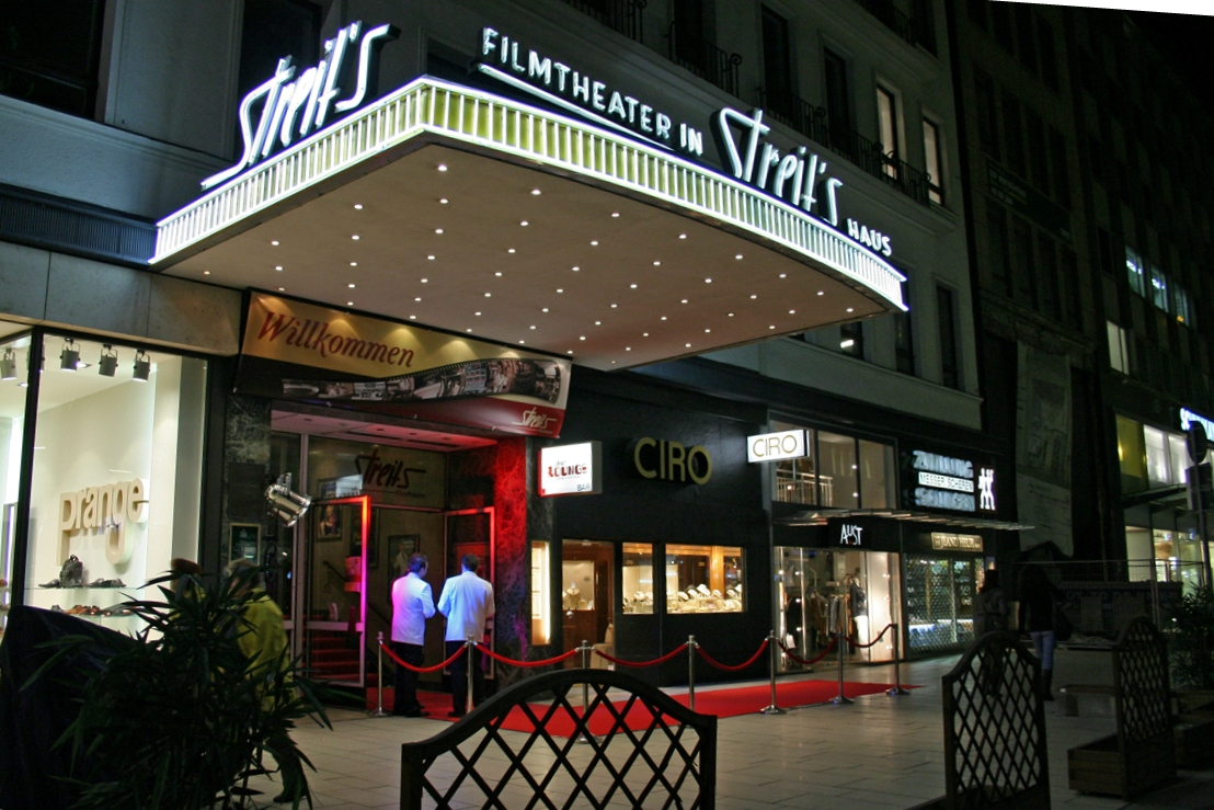 Außenansicht des Streits Filmtheaters in Hamburg (Jungfernstieg)